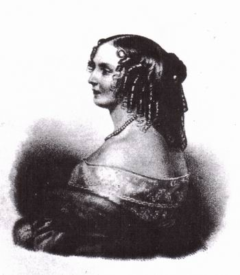 Pauline von Württemberg (1810-1856), 2. Frau von Wilhelm I. (Nassau) (1792-1839)